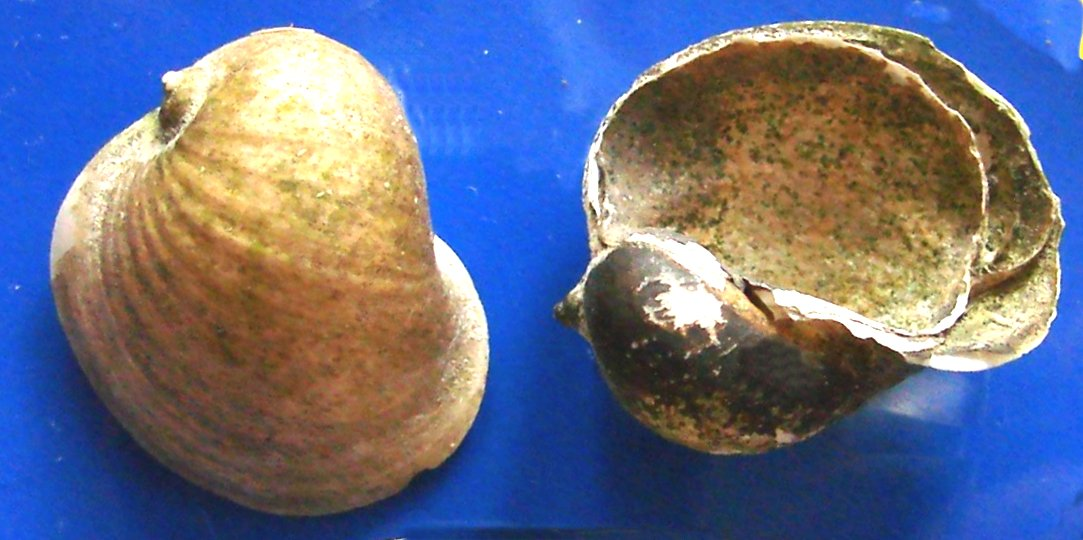 Limnaea peregra var. ampla